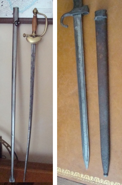 Fourreaux d'épée et de baïonnette (collection personnelle)